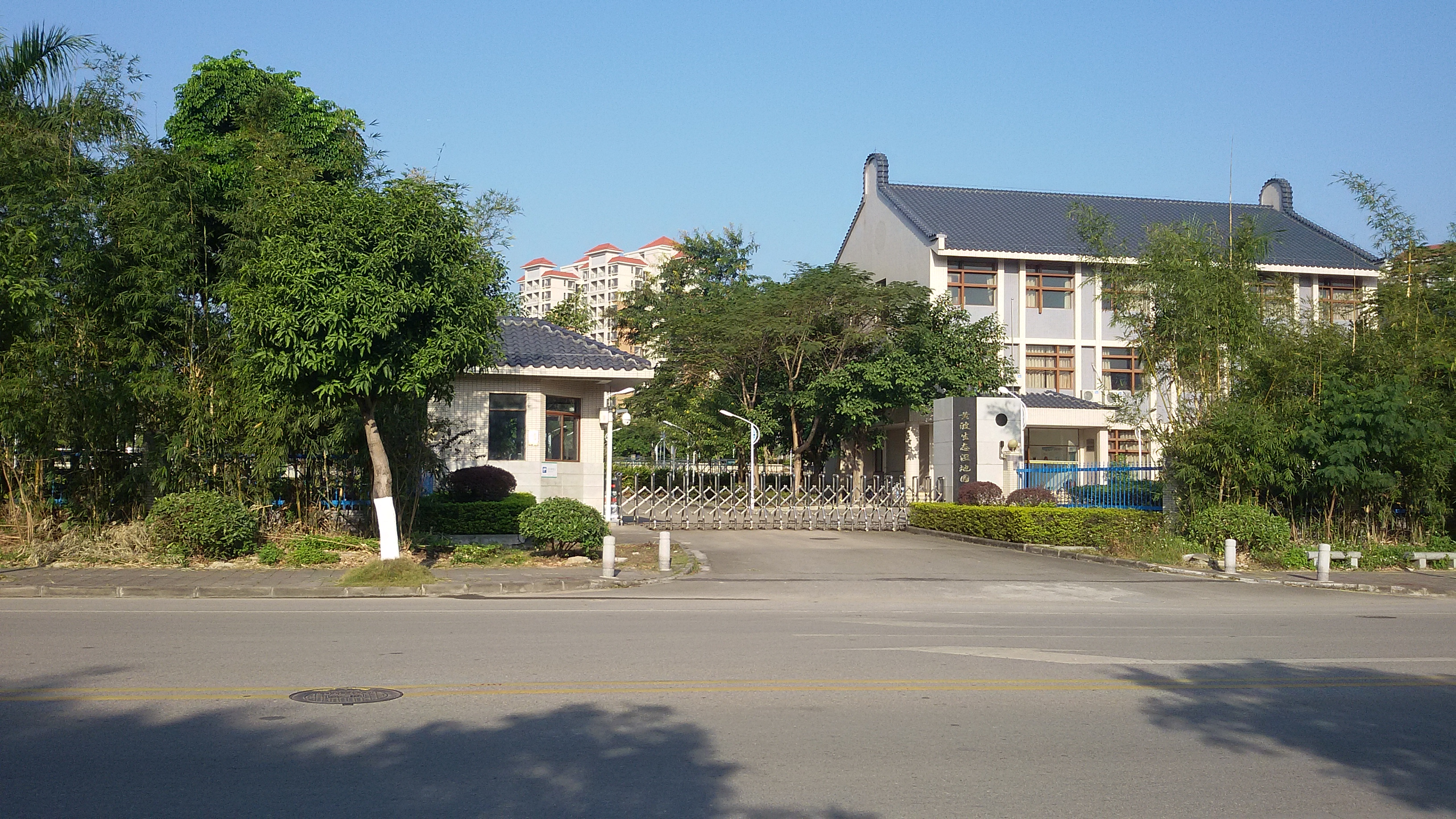 粵語: 黃陂生態濕地園